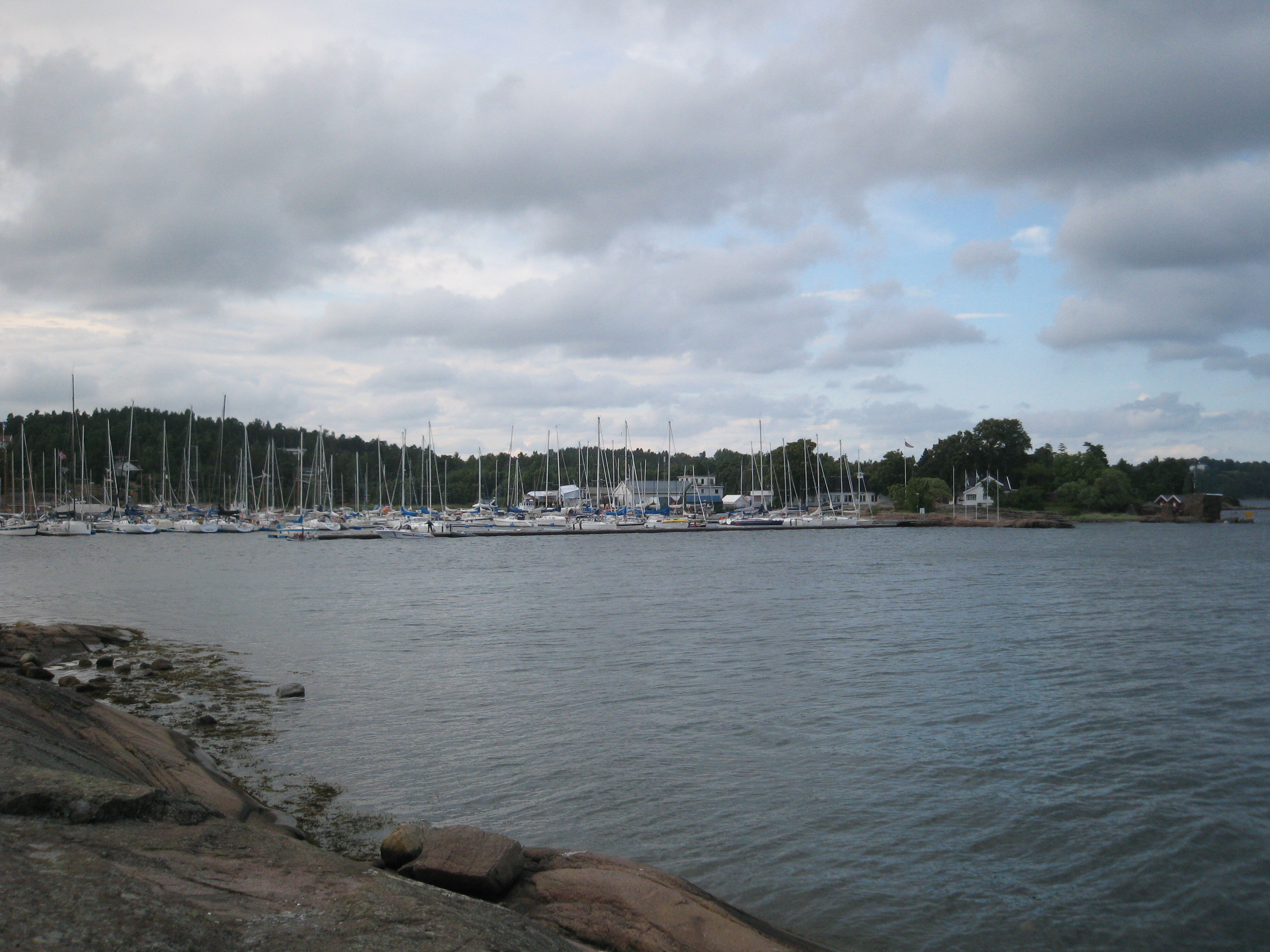 Tønsberg Seilforening v/ Fjærholmen, sett fra Barneskjær